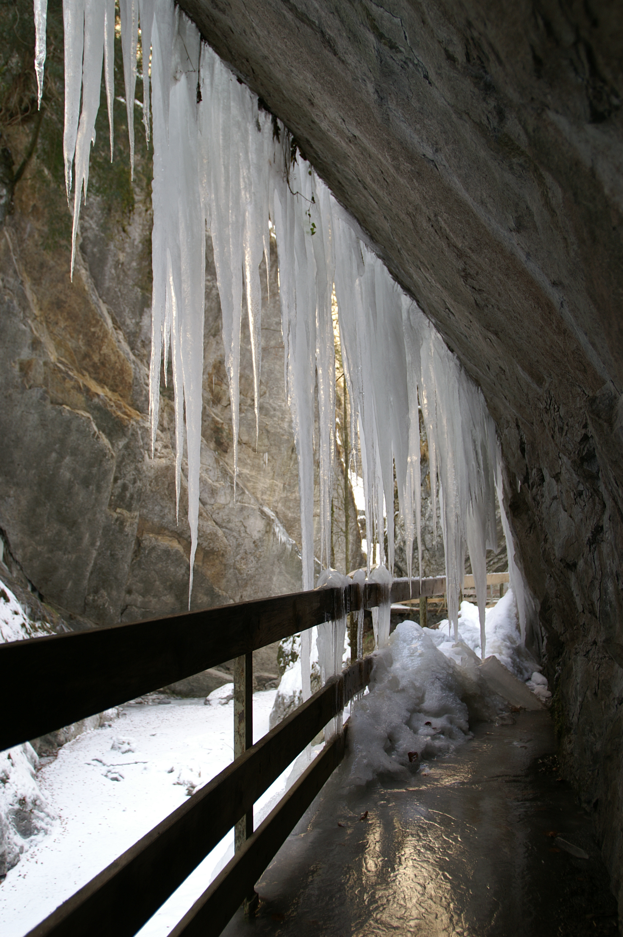 Dornbirn, Rappenlochschlucht